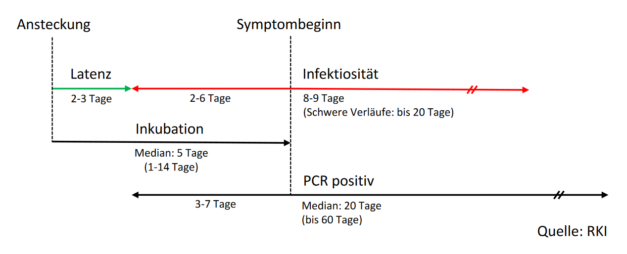 Vereinfachte Darstellung der Daten einer (urheberrechtlich geschützten) Grafik des RKI